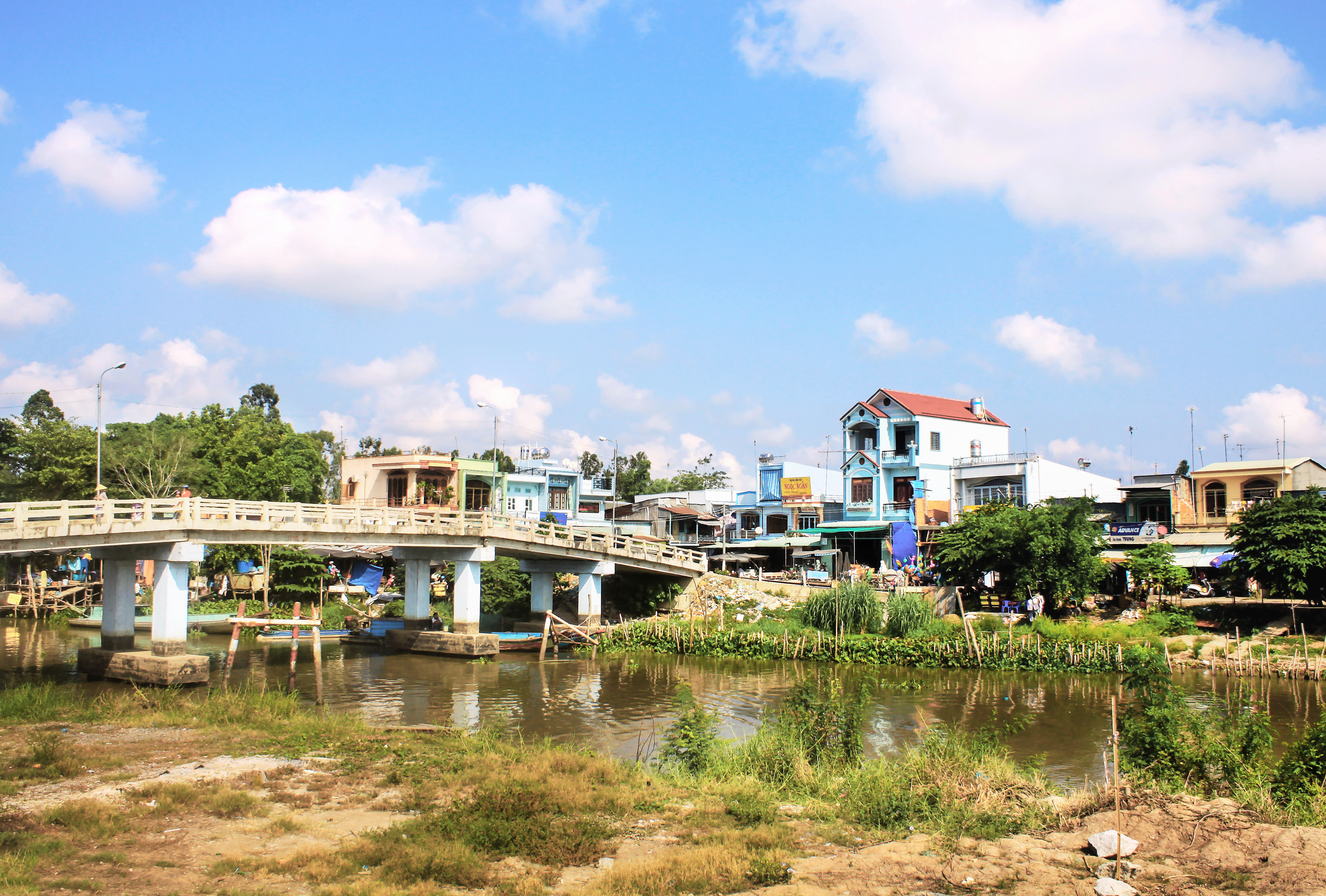 Một cảnh ở chợ Vĩnh Khánh, thuộc huyện Thoại Sơn, An Giang, Việt Nam.